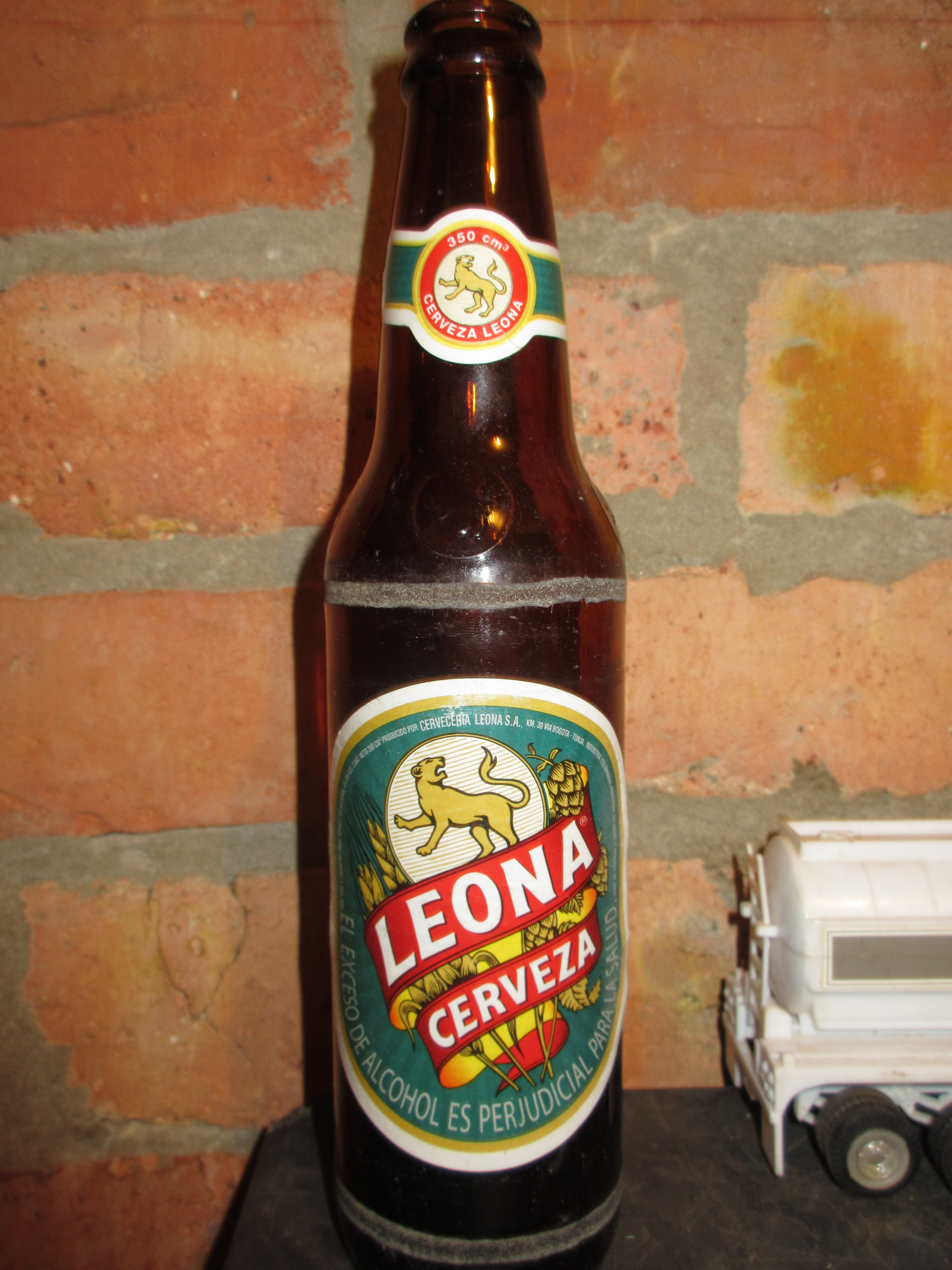 Fotografía tomada en abril de 2019 a un envase de la desaparecida cerveza Leona